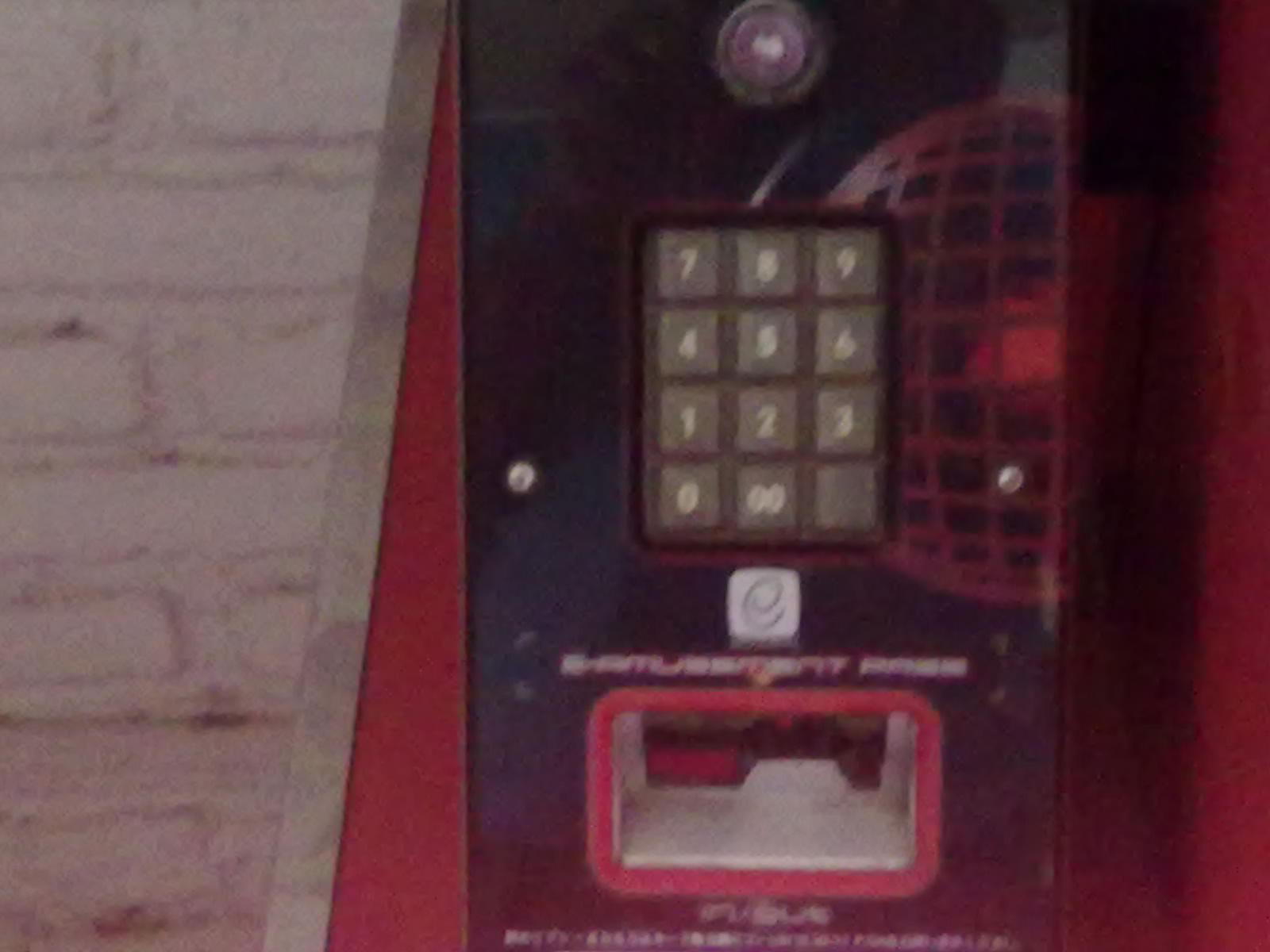 Lector de tarjetas e-Amusement en una DDR junto con el teclado numérico